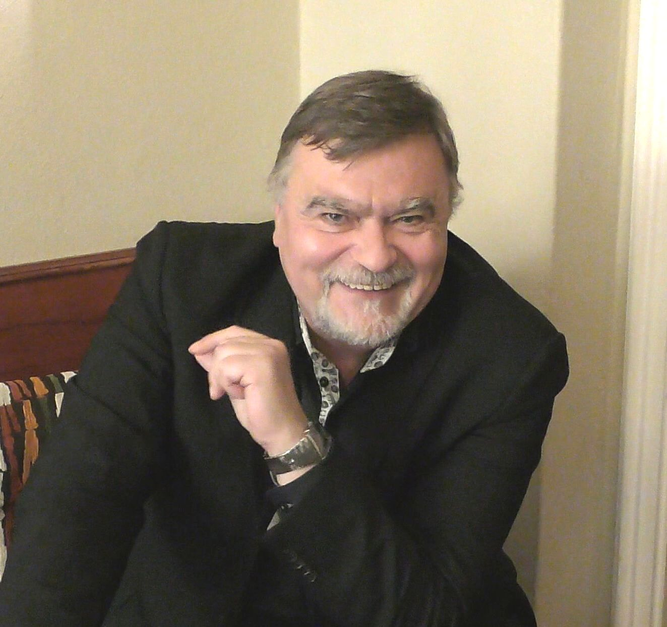 Herec Jiří Schwarz